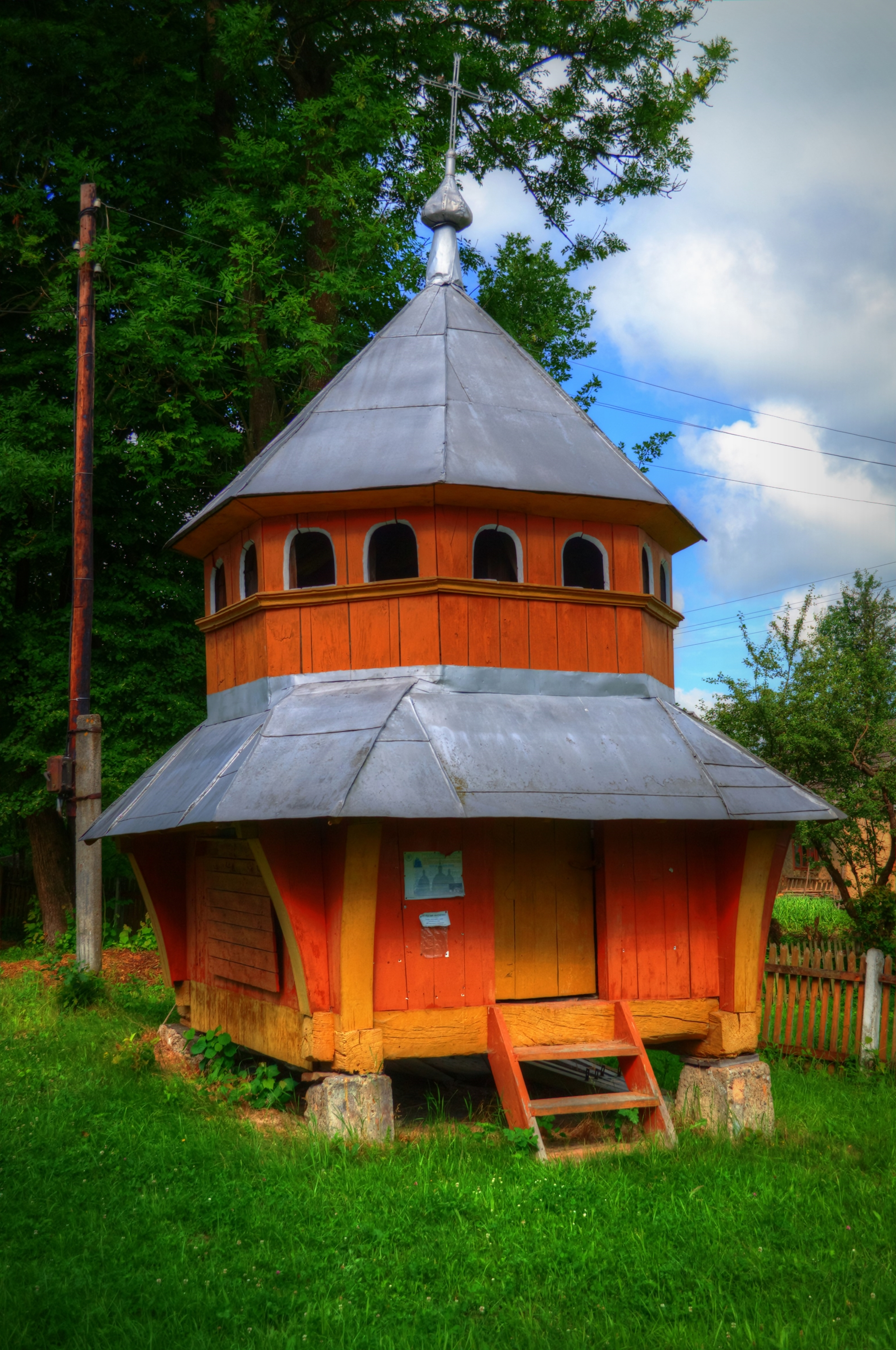 Дзвіниця 1806 року в селі Корчівка Жидачівський район